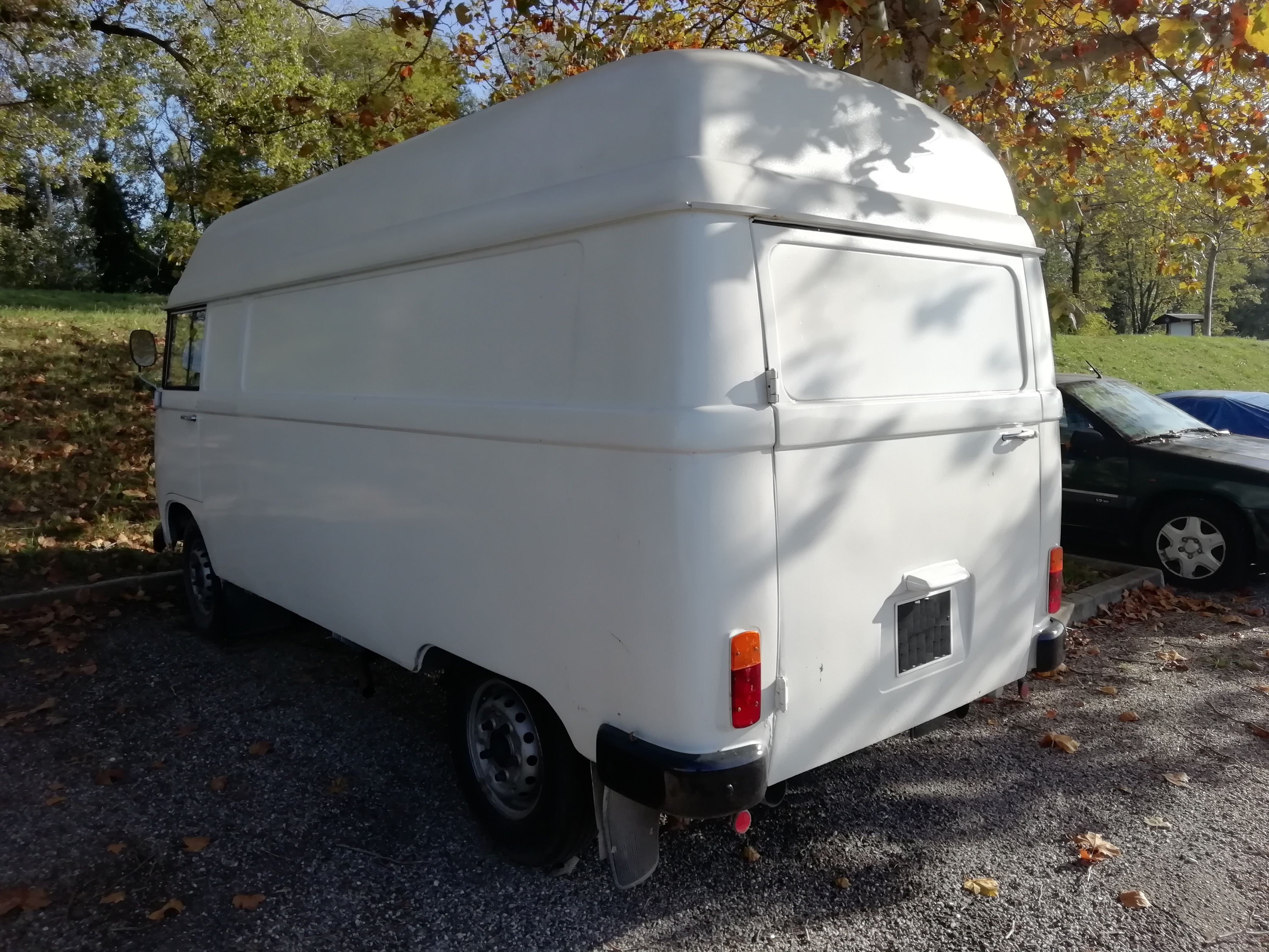 Un Harburger Transporter en 2019